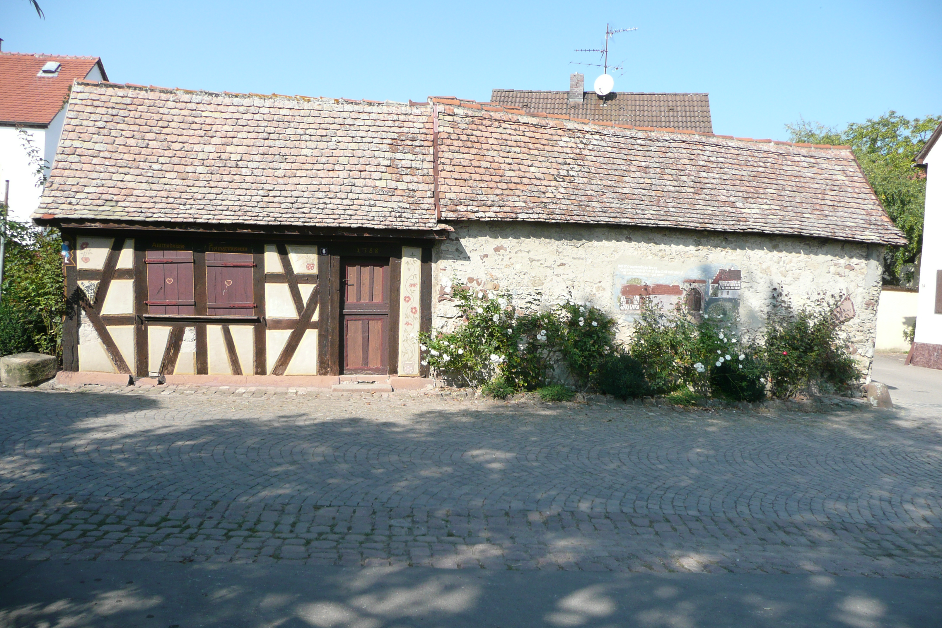 Das heutige Heimatmuseum wurde 1788 als Nachtlager für Arbeiter erbaut, damit sie sich den Nachhauseweg ersparen konnten.